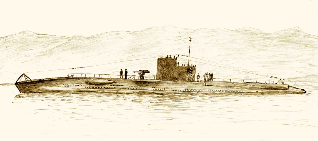 Французская субмарина "Дорис", период Второй мировой войны